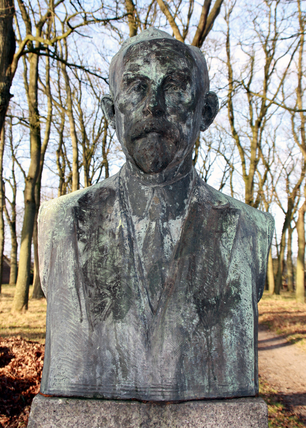 Willem Emmens 1869-1927 buste door Auguste Falise (1928). Zeijen